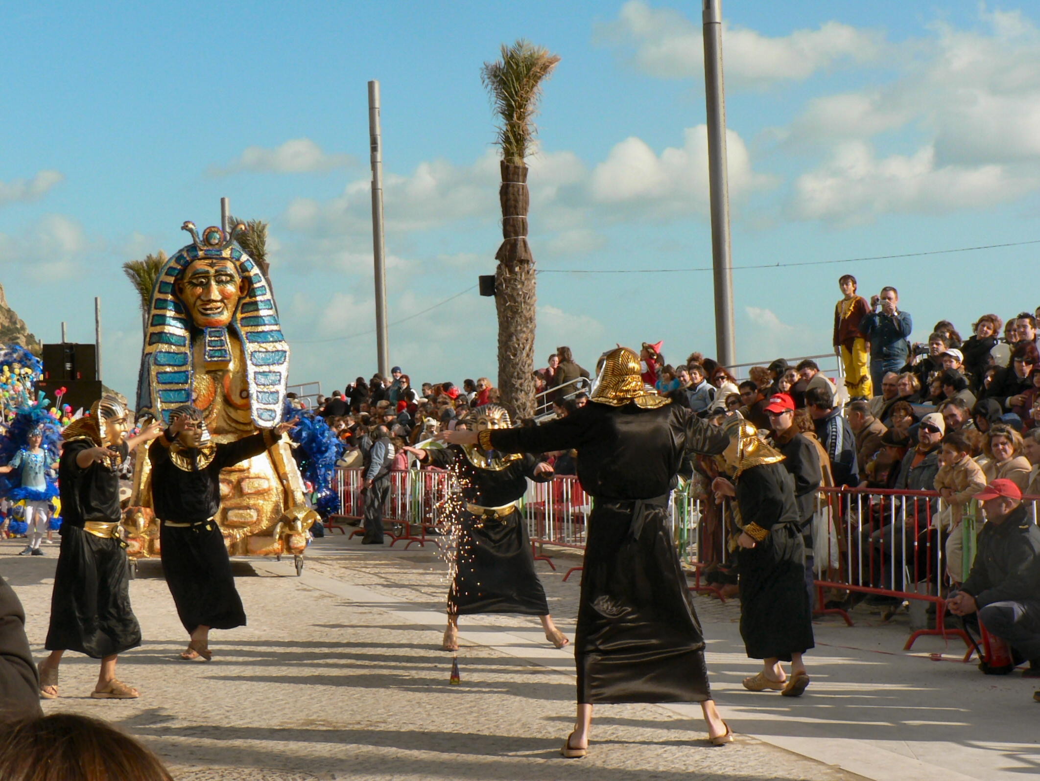 Desfile de Carnaval em Sesimbra 2007